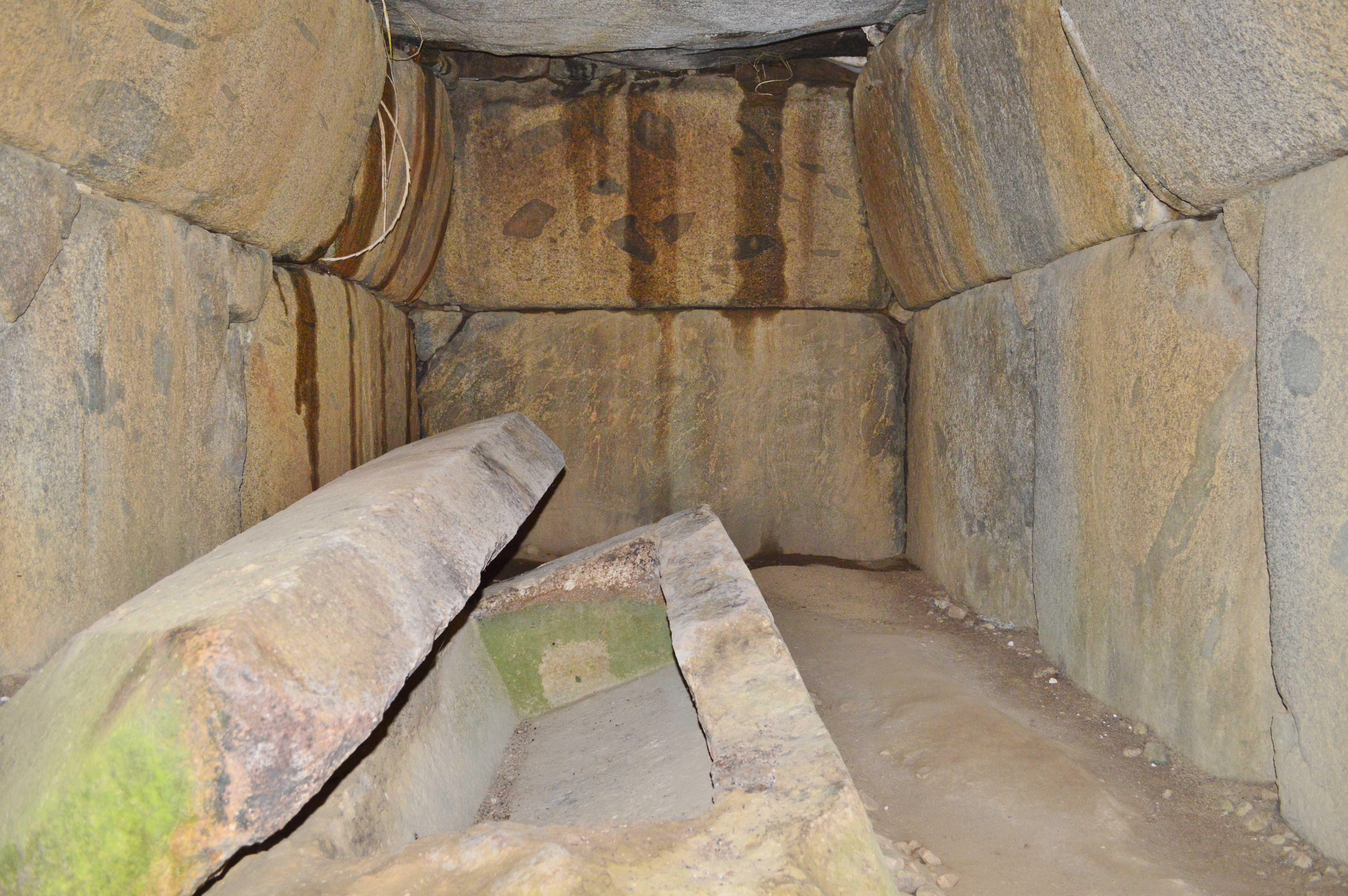 小谷古墳 石室玄室